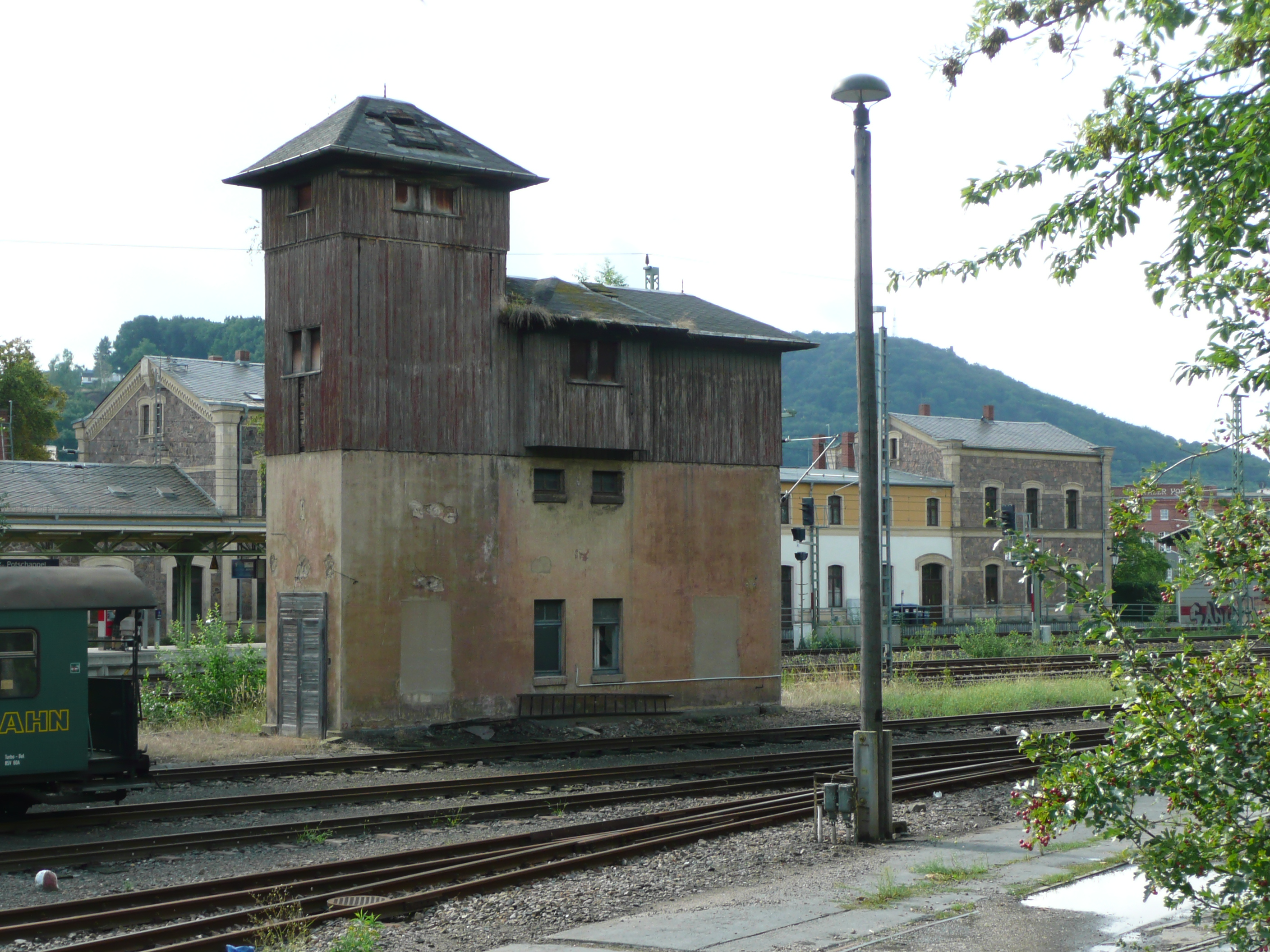 Gepäcküberführungsturm mit Windberg im Hintergrund des Bahnhof Freital-Potschappel